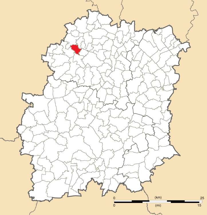 Carte de position de Gometz-le-Châtel en Essonne (91)